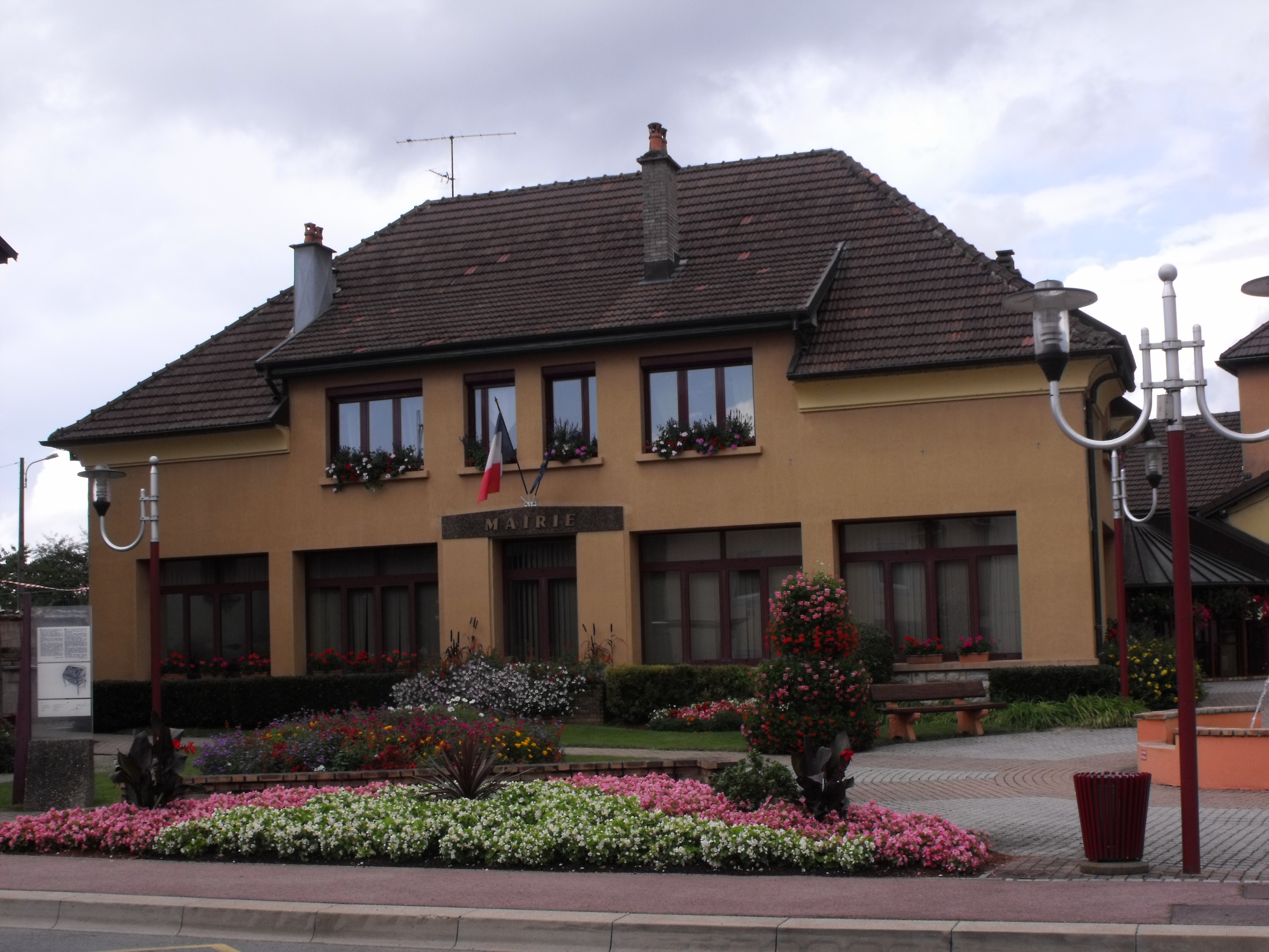 Mairie de Bart, Doubs, France